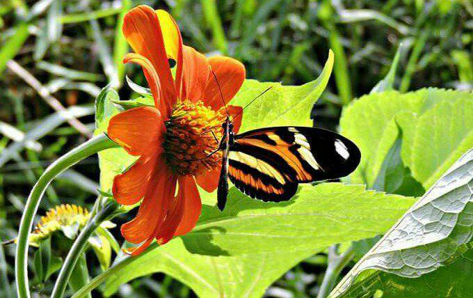 Heliconius ethilla narcaea - Pindamonhangaba SP - Brasil